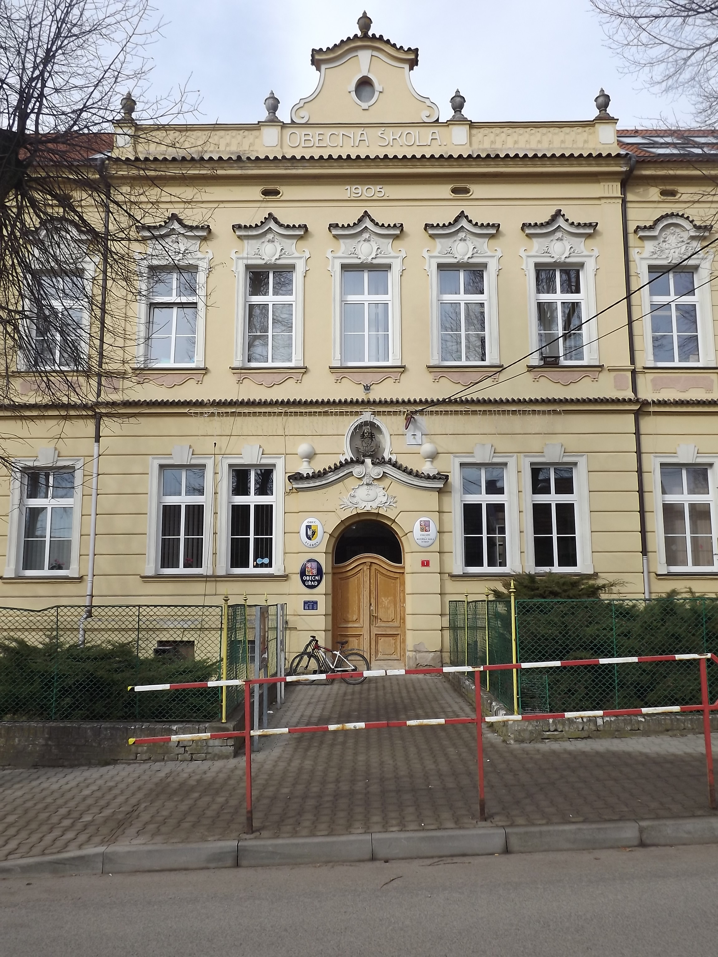 Svárov, škola